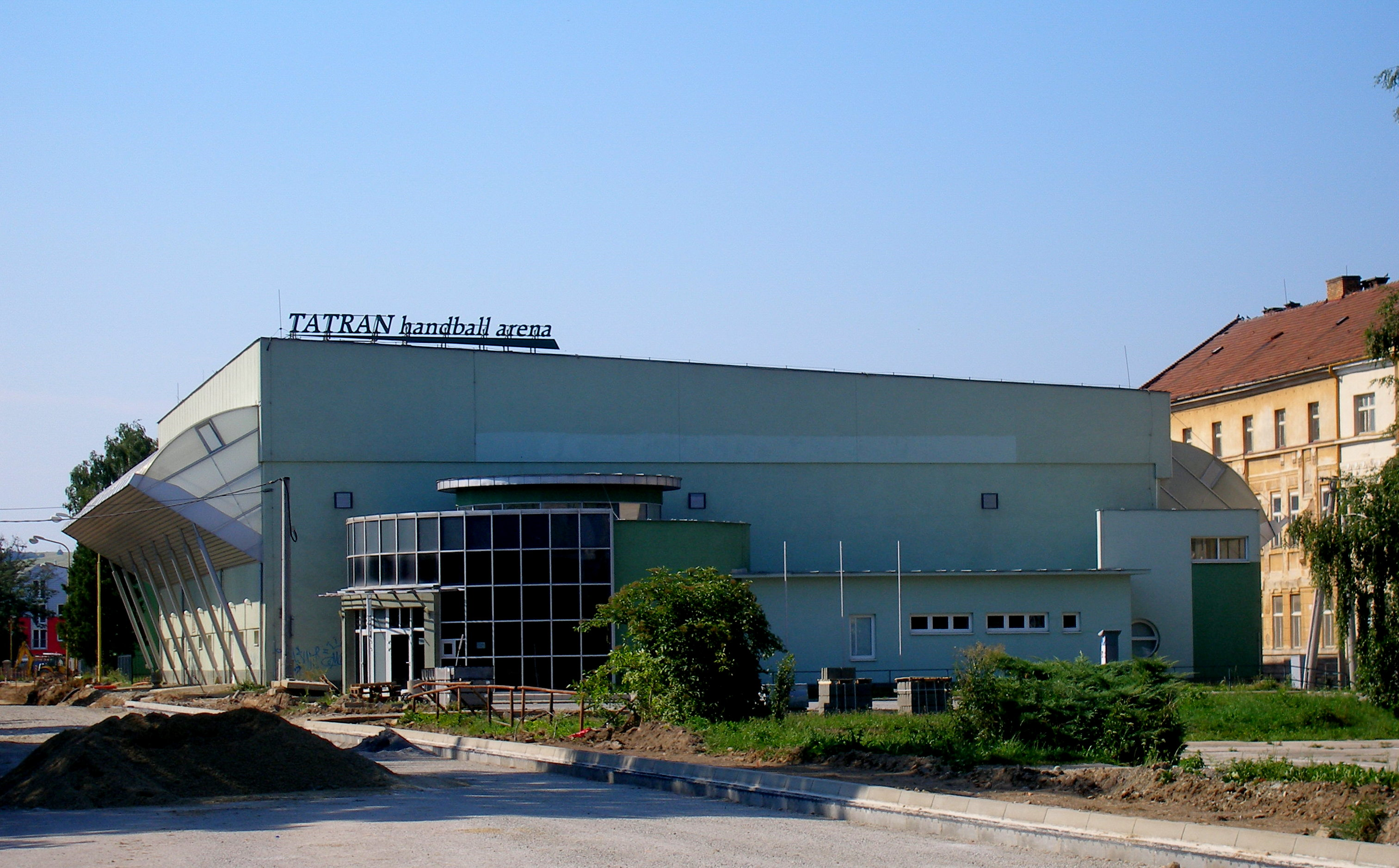 Ulica Okružná v Prešove. Hádzanárska športová hala.